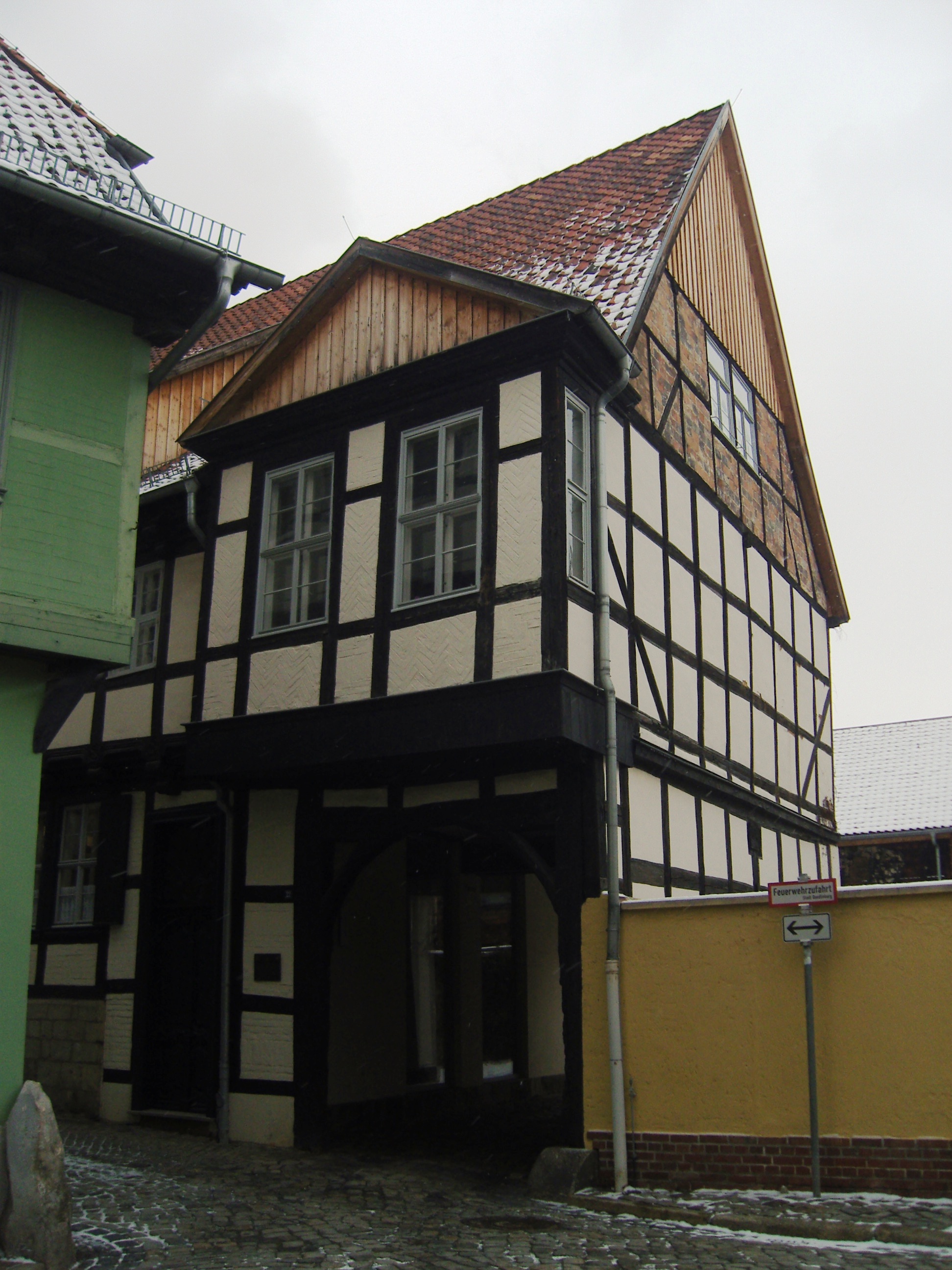 Denkmalgeschützter Kaufmannshof im Weingarten 22 in Quedlinburg